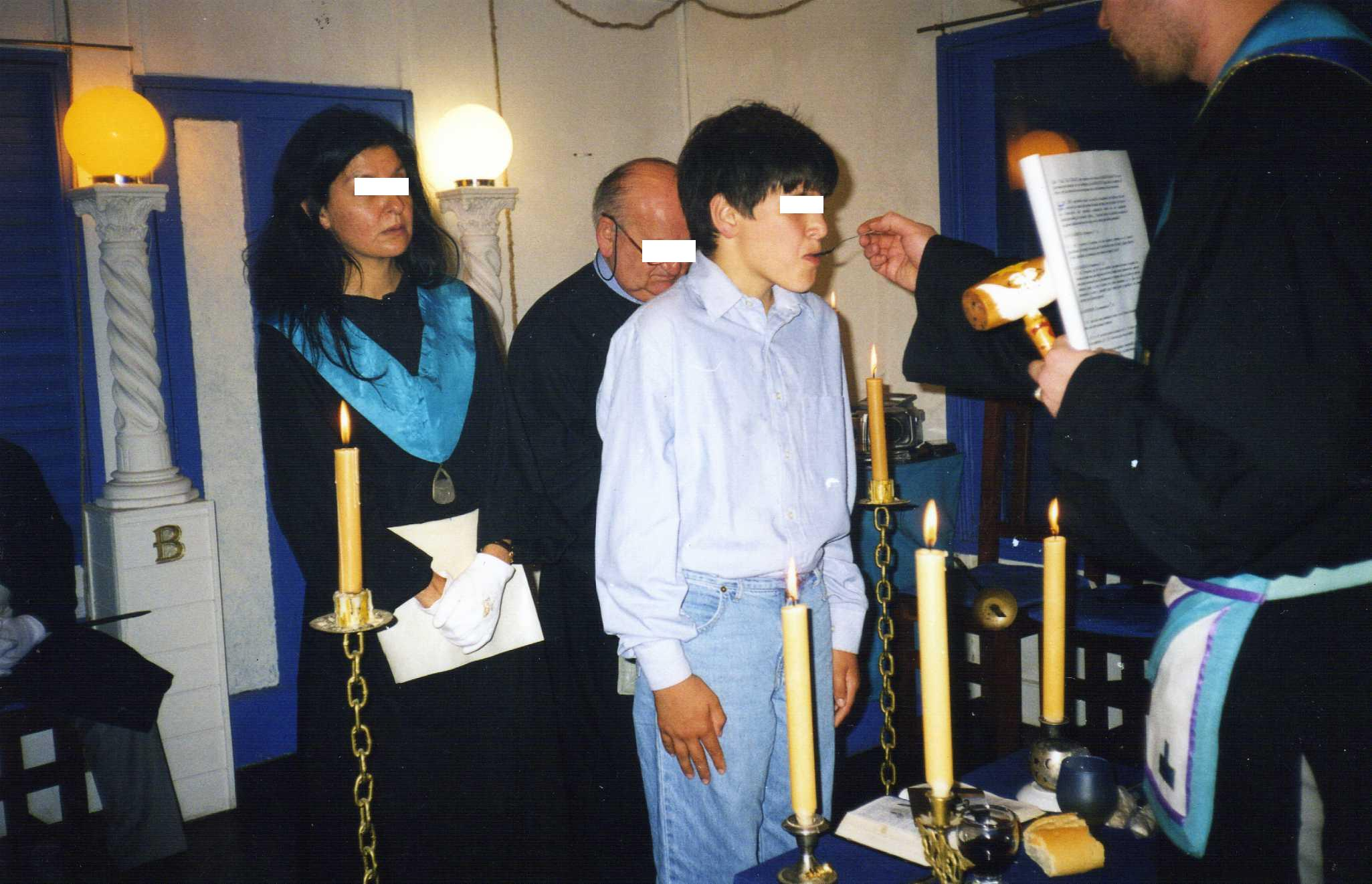 Ritual masónico de adopción de un loweton.